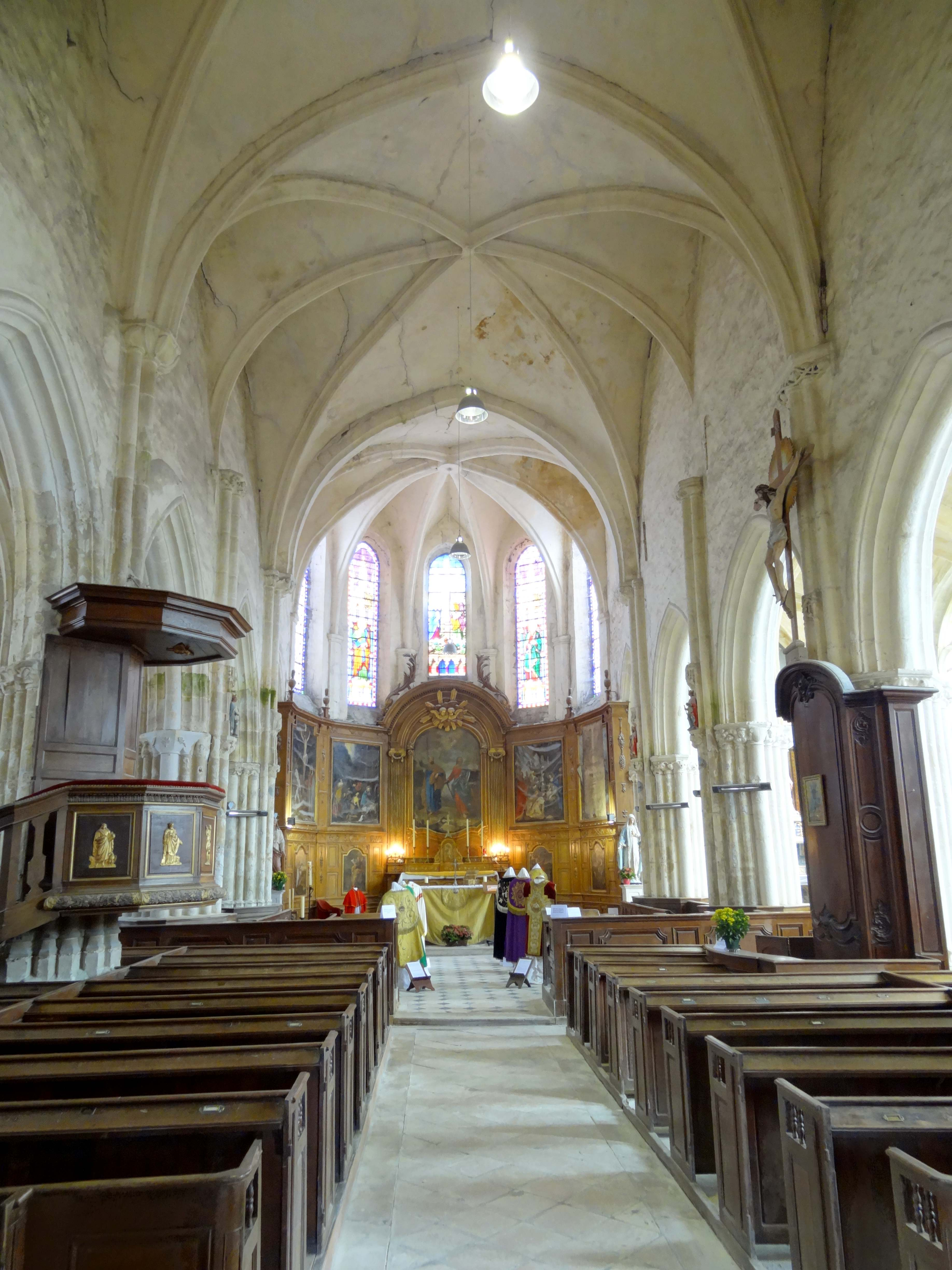 Intérieur de l'église - voir titre.